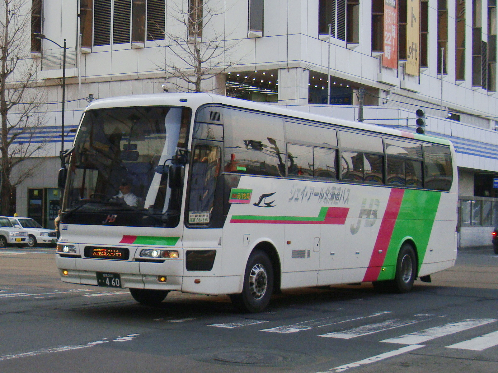 "Kōsoku Erimo gō" Sapporo to Erimo